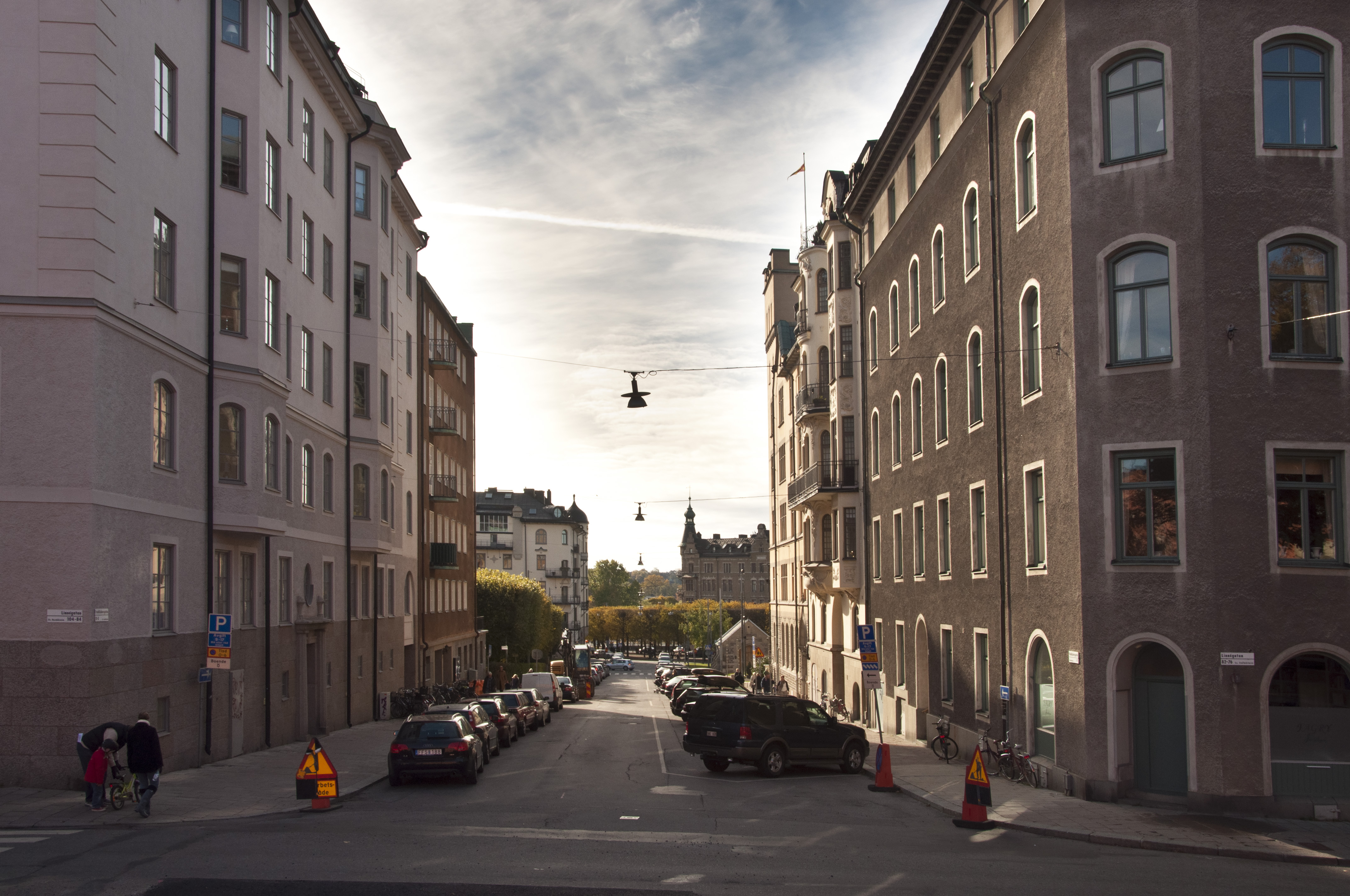 Fredrikshovsgatan